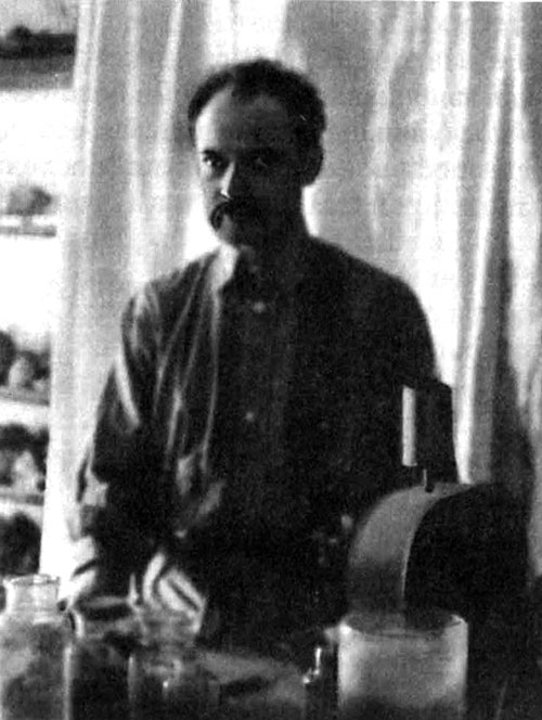 Александр Николаевич Семихатов (1882‒1956) — советский учёный-гидрогеолог, заслуженный деятель науки и техники РСФСР, выпускник физико-математического факультета Московского университета (1910).